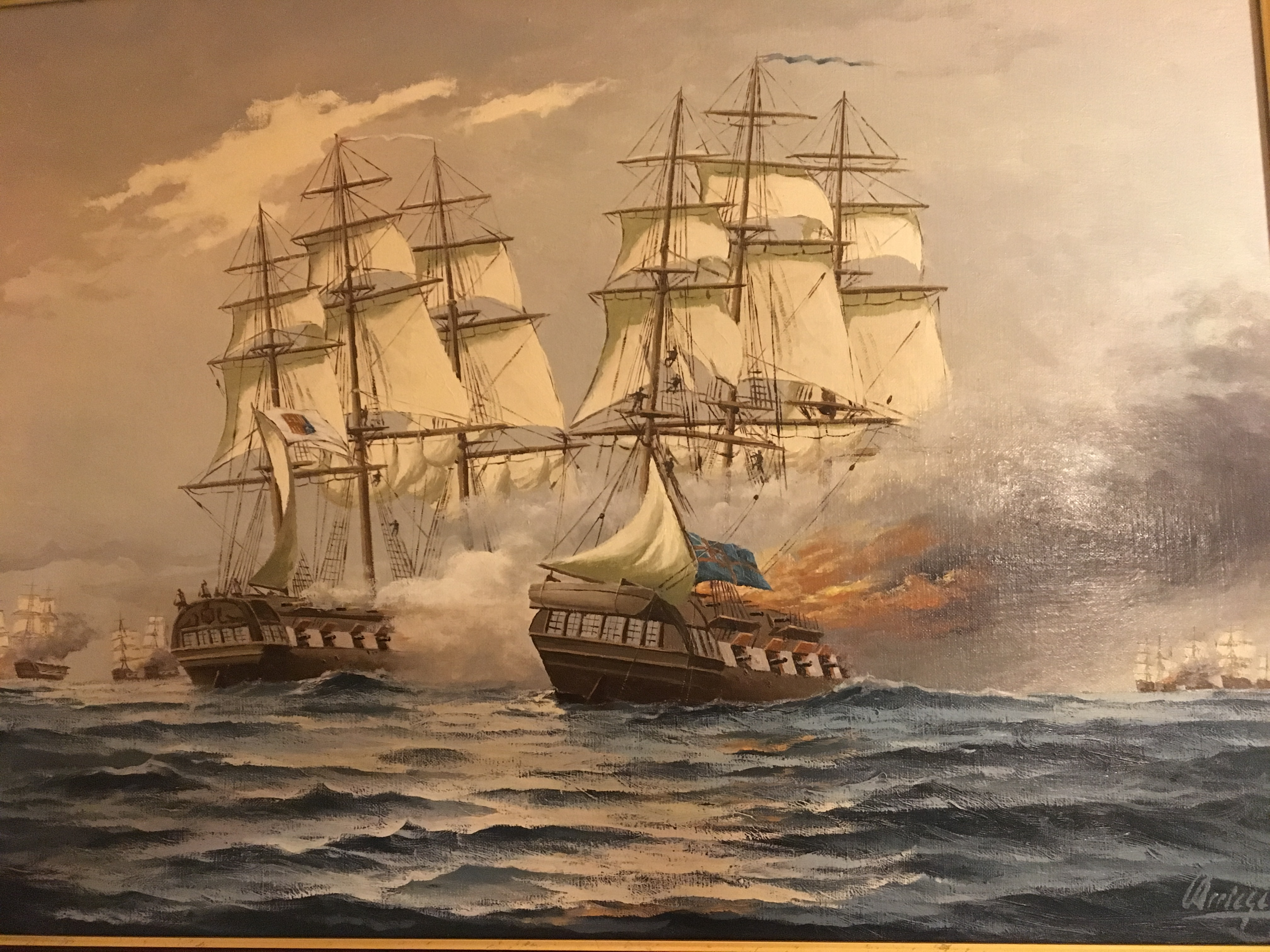 Óleo de Esteban Arriaga pintado en 1998, representando la Batalla Naval de Vélez Málaga de 1704 que enfrentó a la flota de la alianza francesa y española contra la inglesa-holandesa, por la toma por parte de los ingleses del peñón de Gibraltar. En dicha batalla, un joven Blas de Lezo perdió una pierna.